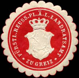 Sealing stamp Title: Fürstlich Reuss. Pl. Ä. L. Landratsamt zu Greiz Description: rot, weiß, geprägt Place: Greiz size: 4 cm